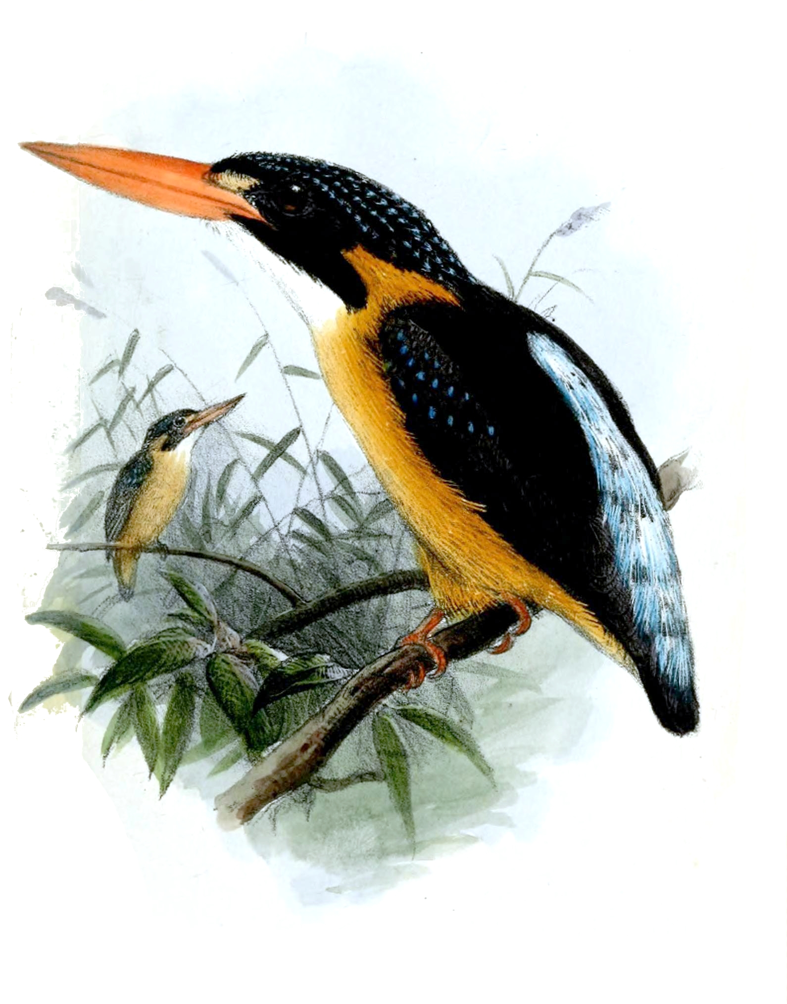 Ceyx cajelli = Ceyx lepidus cajelli